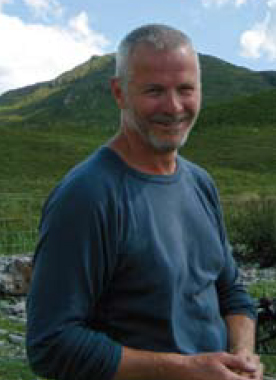 Painter and Film maker James Hawkins